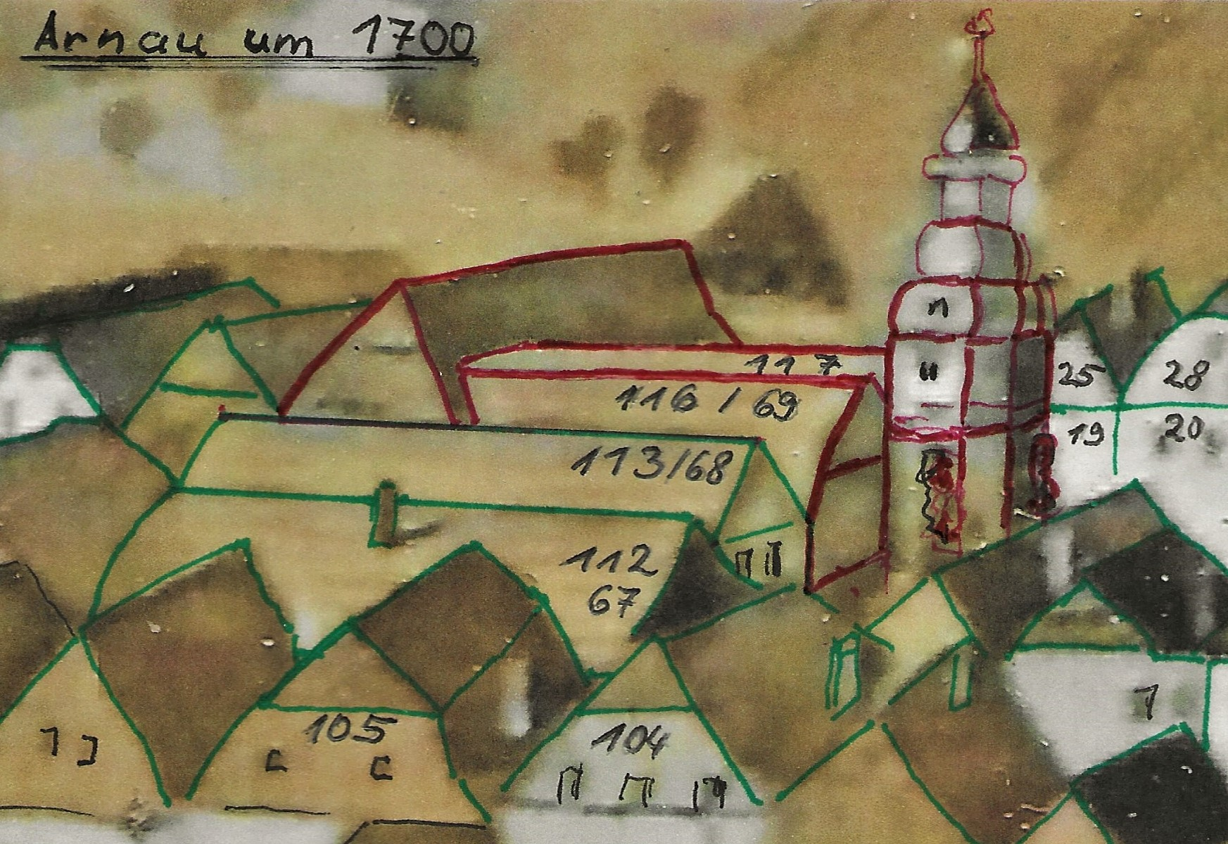 An der Rückfront des Rathauses war um 1700 noch ein höheres Haus angebaut, vermutl. ein innerstädtischer Speicher.